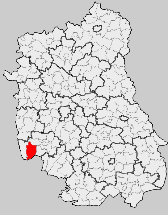 Map of gmina Gościeradów, Kraśnik county, Lublin voivodship Mapa gminy Gościeradów, powiat kraśnicki, województwo lubelskie